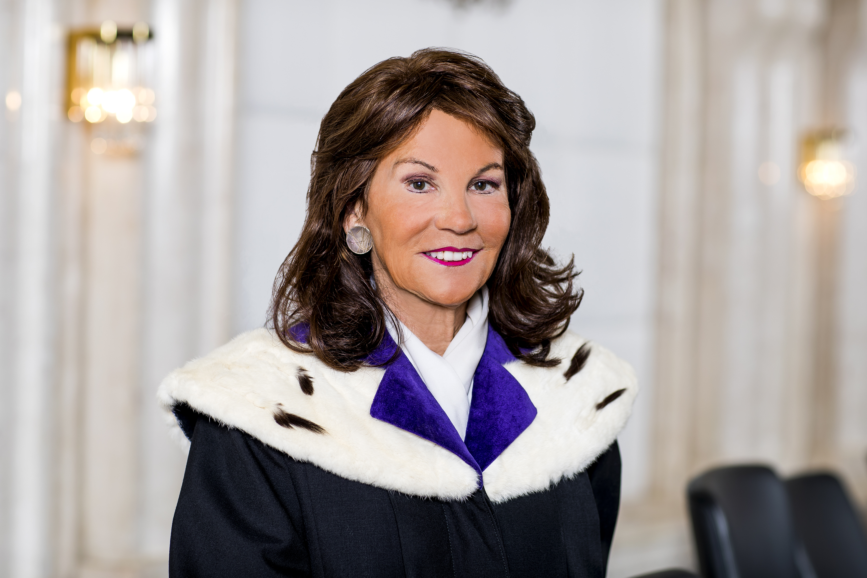 Dr. Brigitte Bierlein, Präsidentin des österreichischen Verfassungsgerichtshofs seit 2018.